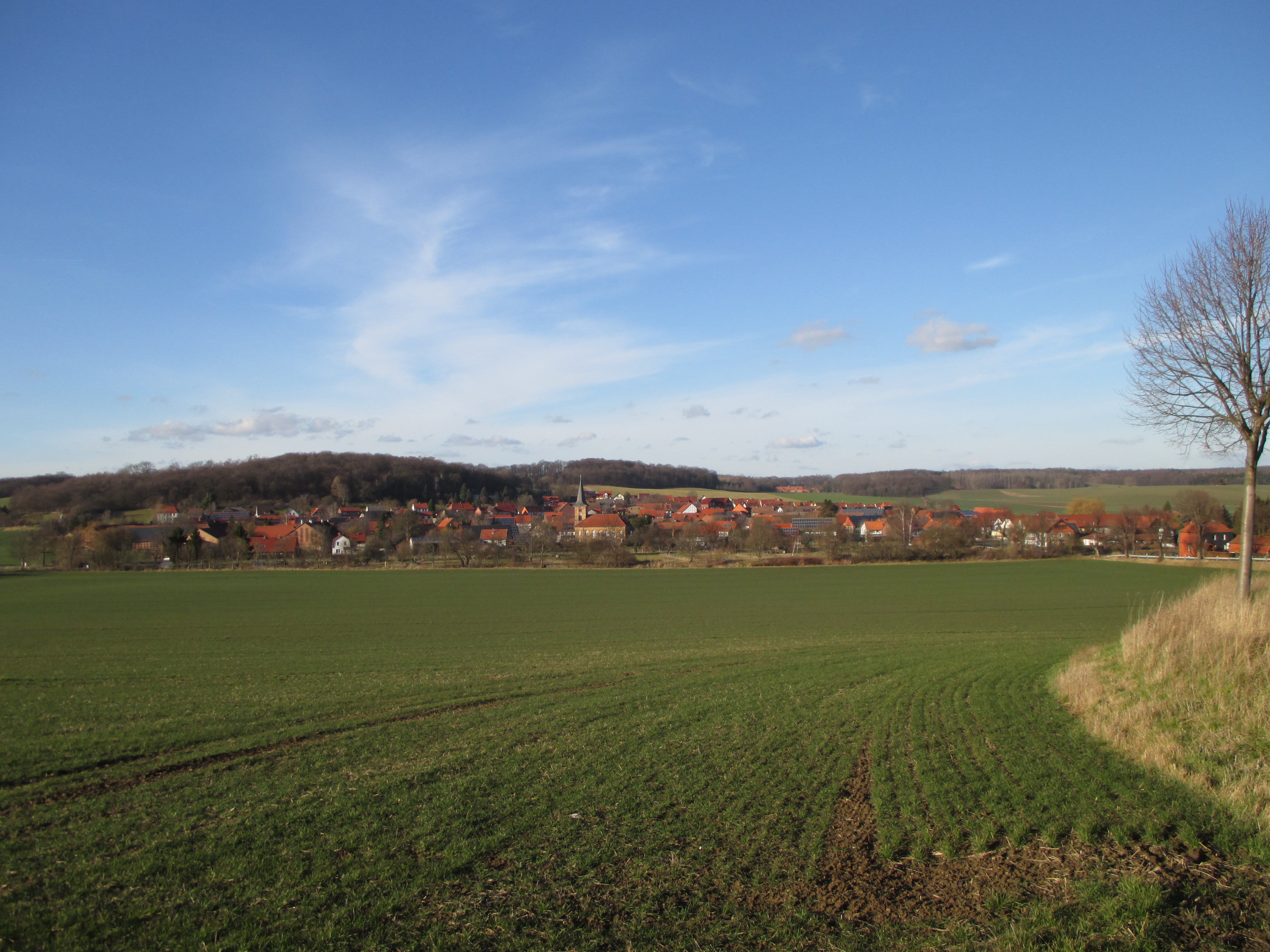 Blick auf Gielde von Süden, Gemeinde Schladen-Werla